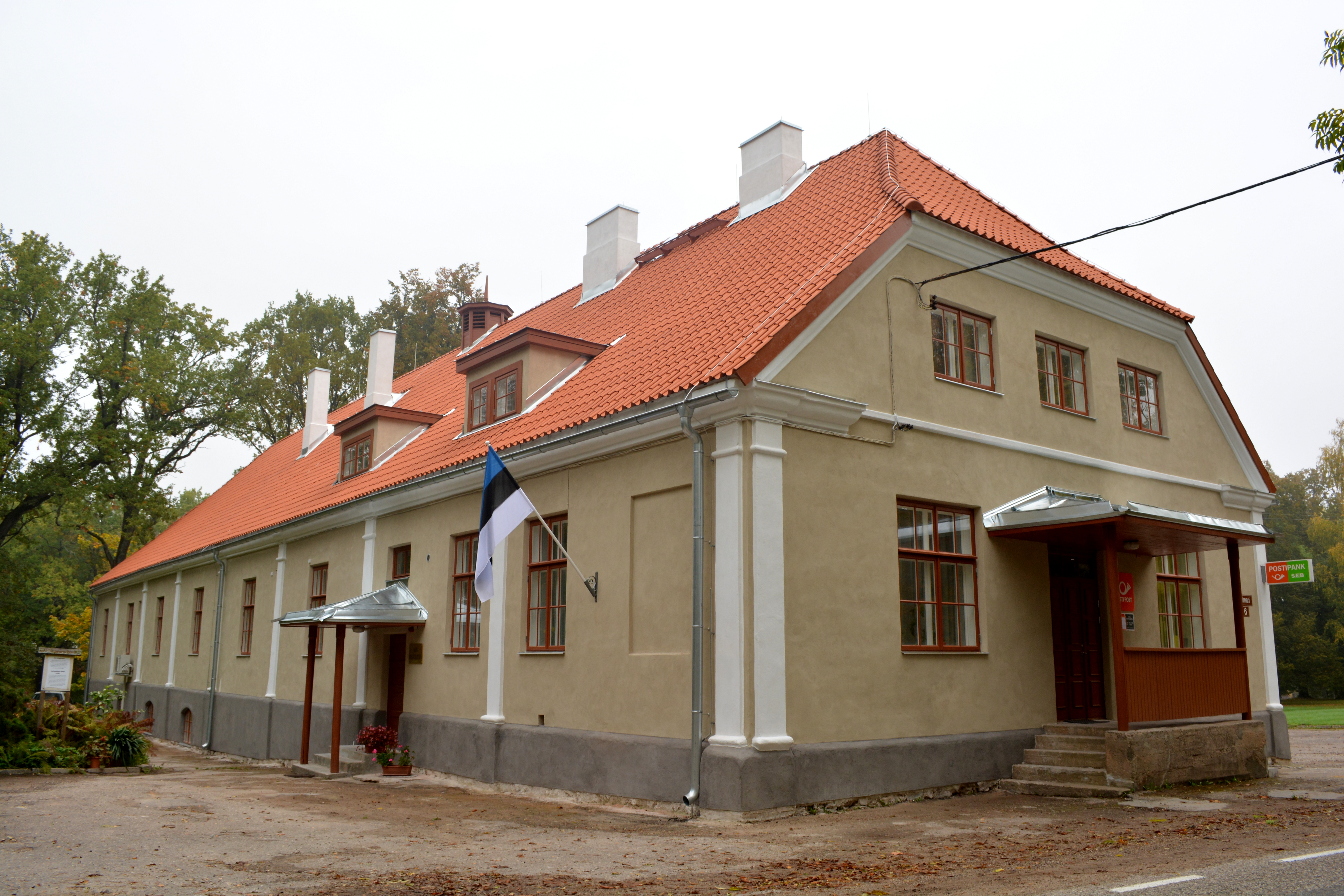 Ahja mõisa ait-kelder